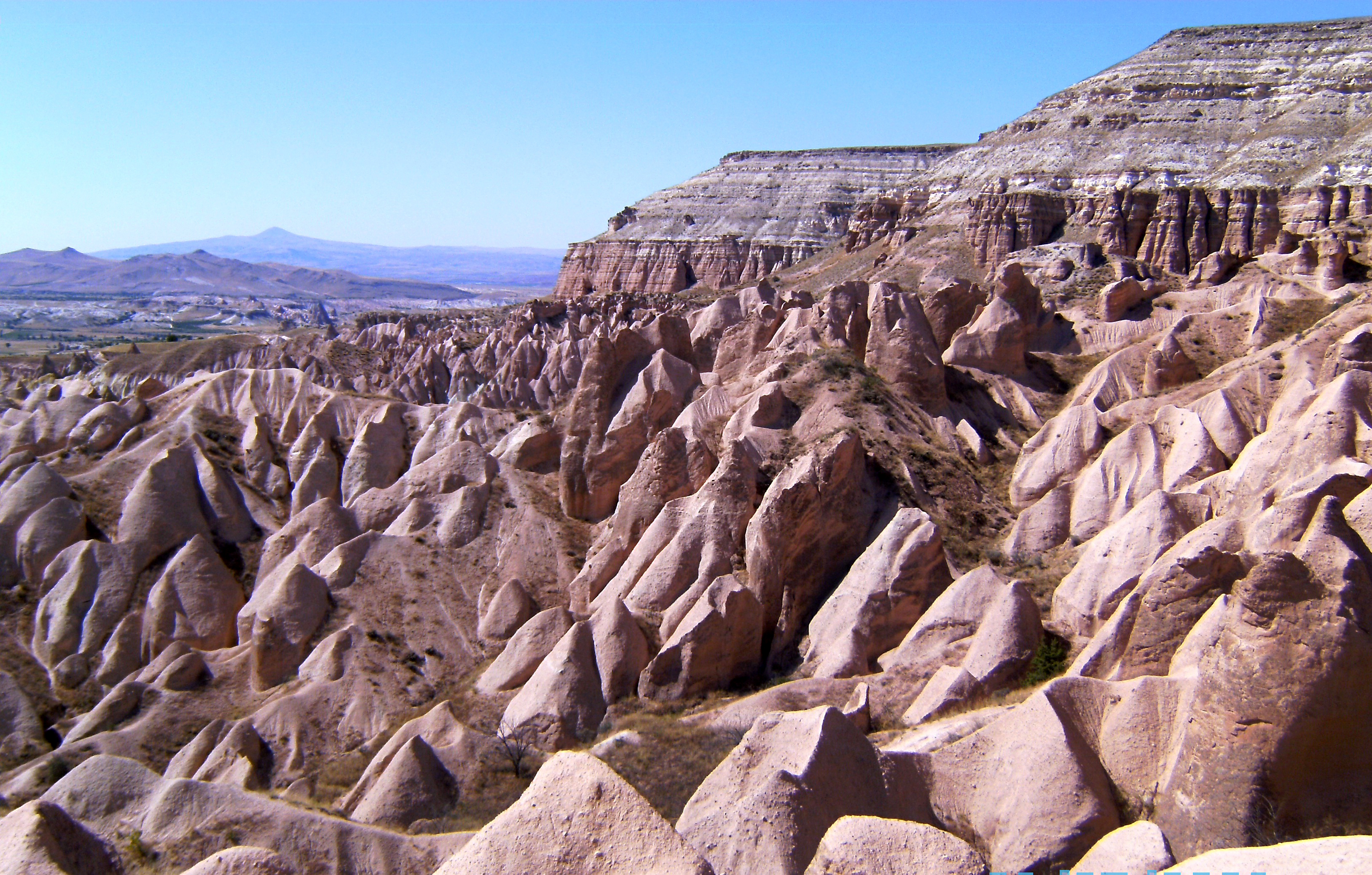 Höhlenstrukturen, Kappodokien